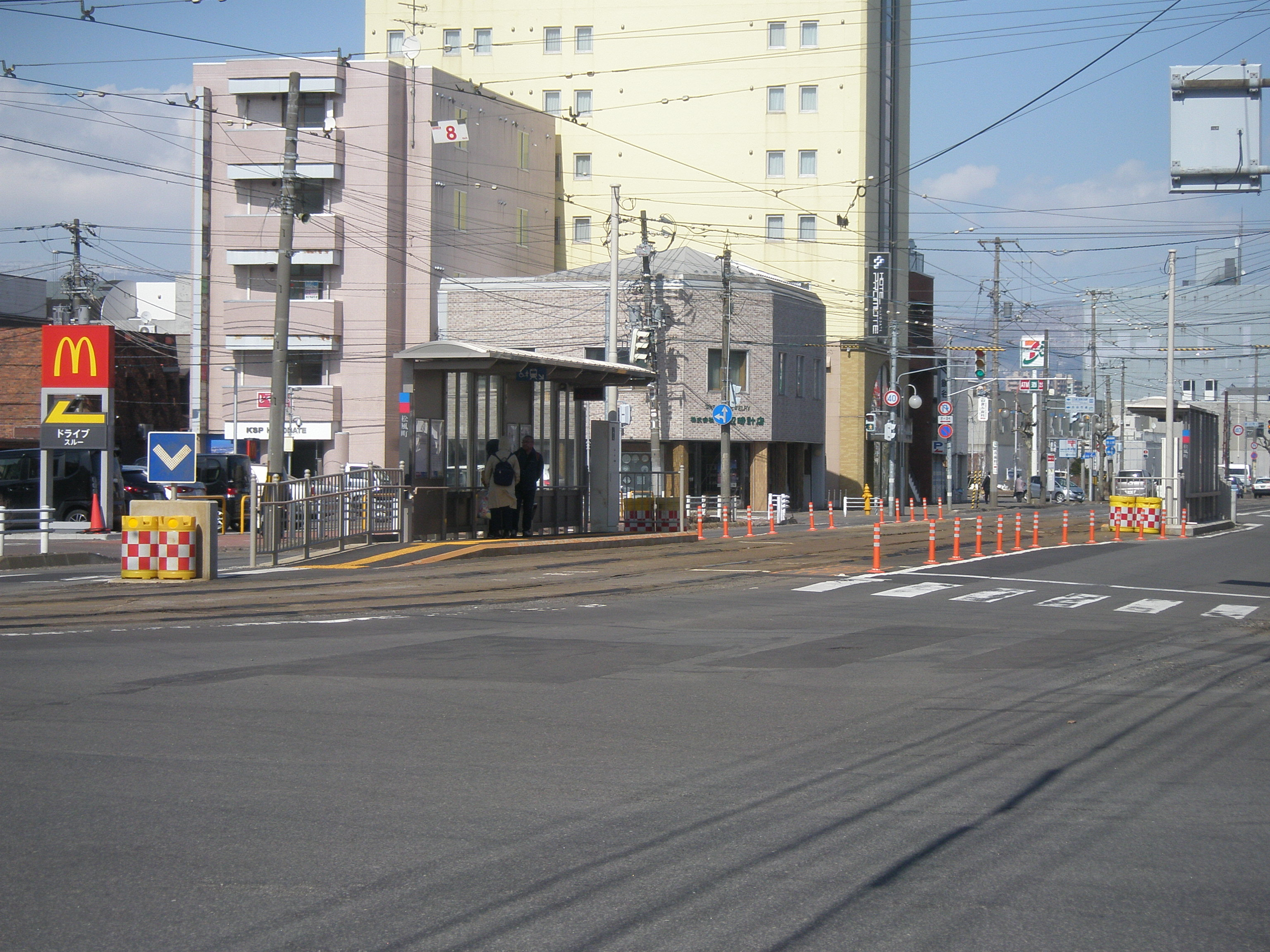 松風町停留場・全景（2018年3月24日撮影）